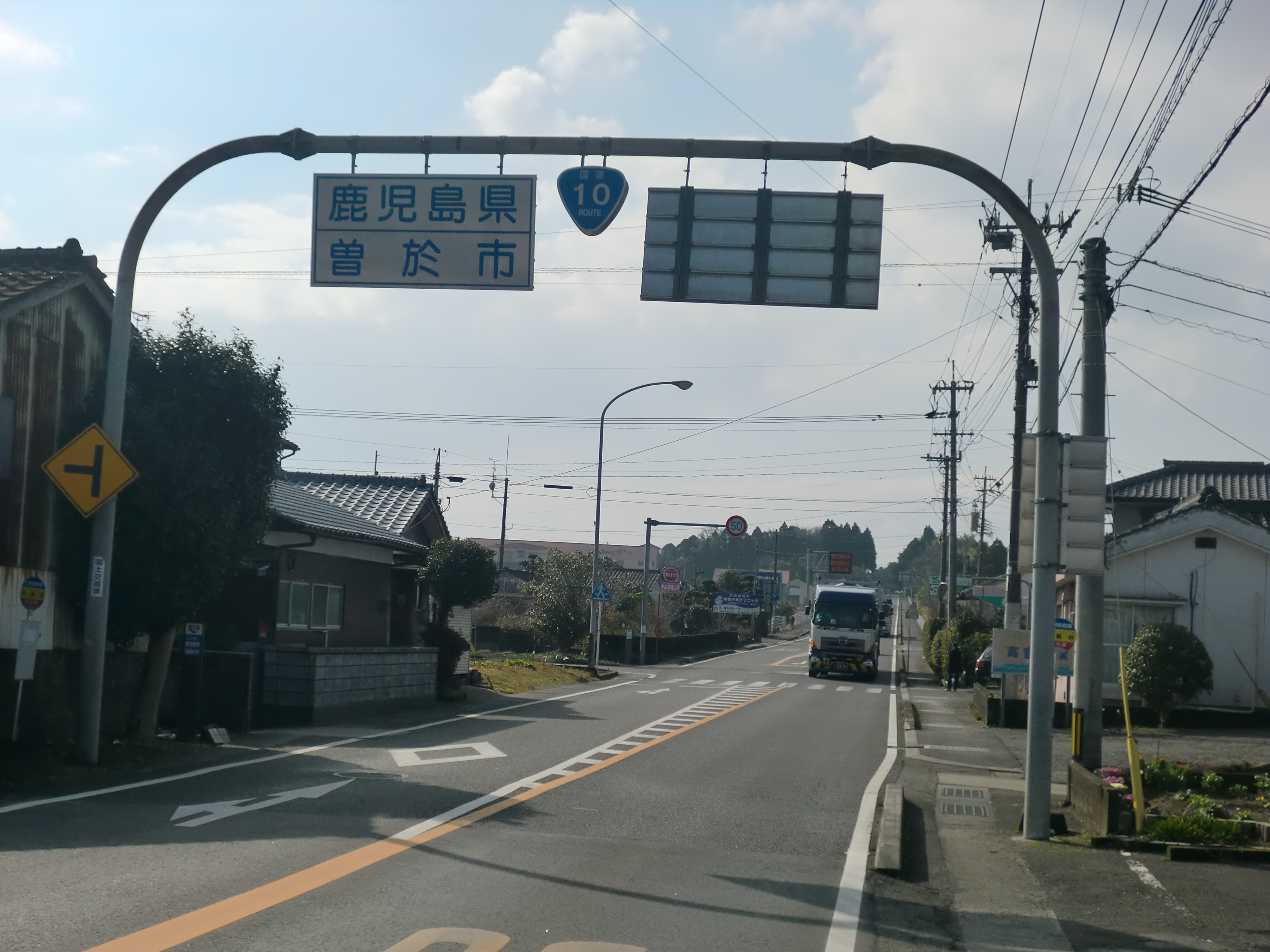 国道10号線にある宮崎県都城市と鹿児島県曽於市の境界。